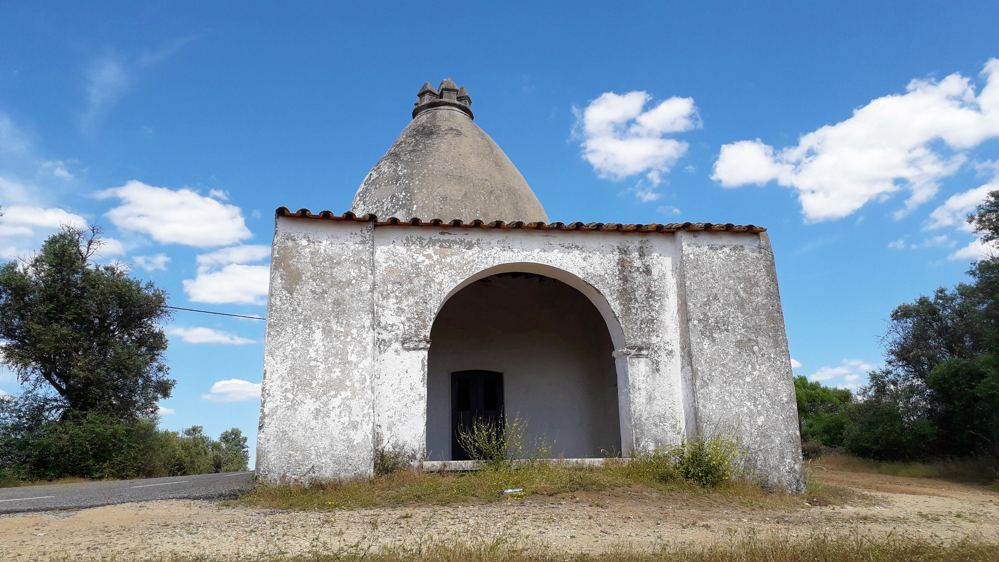 Capela de Santa Luzia (Alvito)